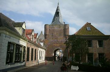 Vischpoort te Elburg, uit eigen collectie foto's. 66″ N, 5° 49′ 54.34″ E